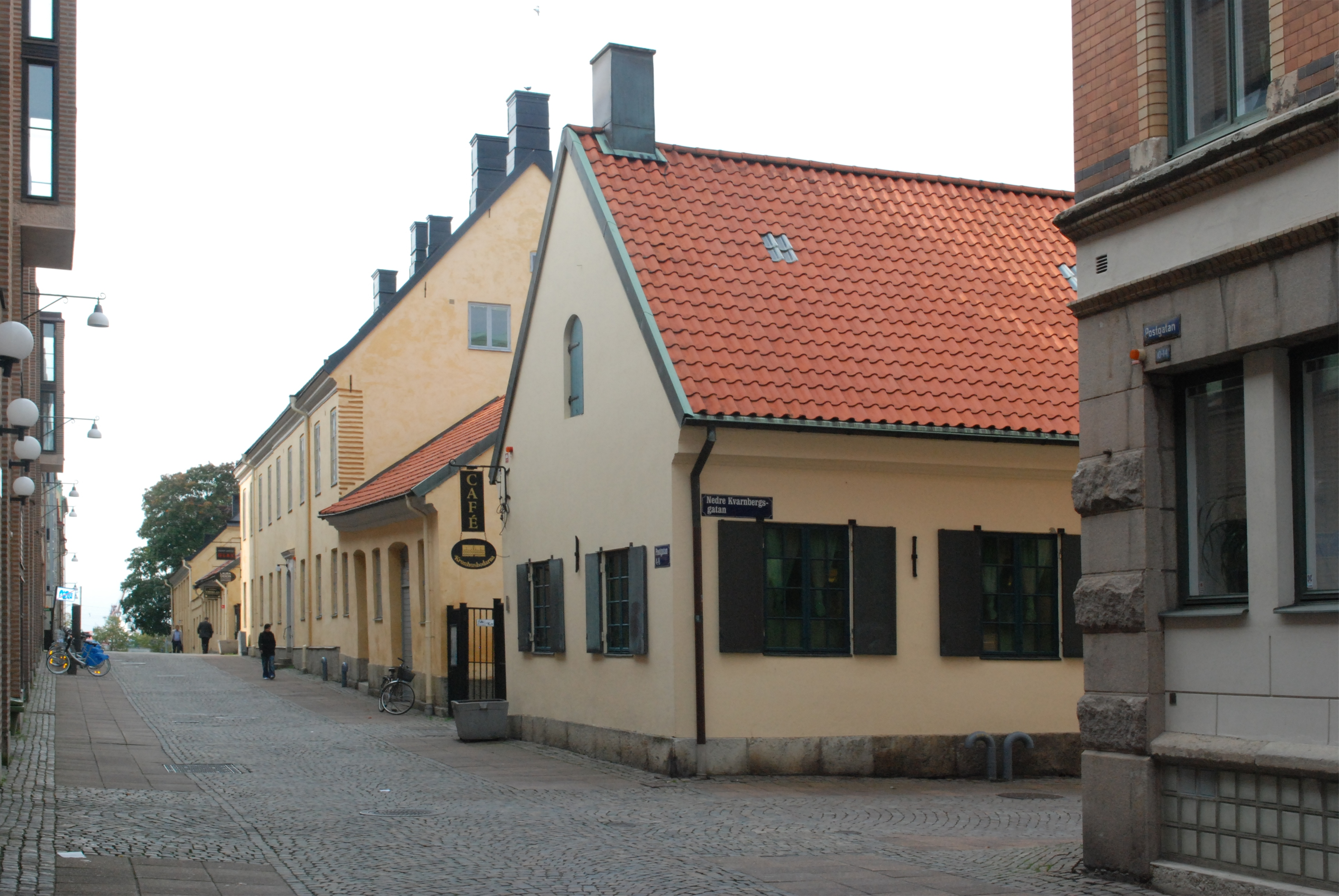 Korsningen Nedre Kvarnbergsgatan/Postgatan sedd från Postgatan (Göteborg).